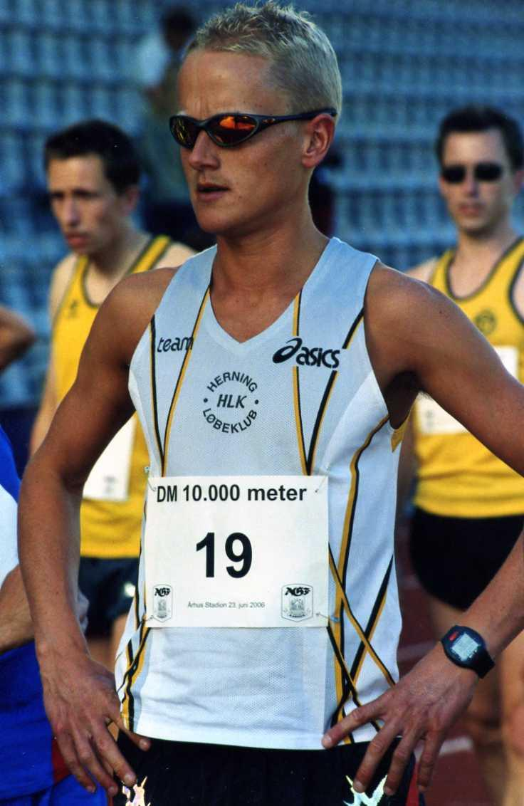 Søren Palshøj før DM 10000m